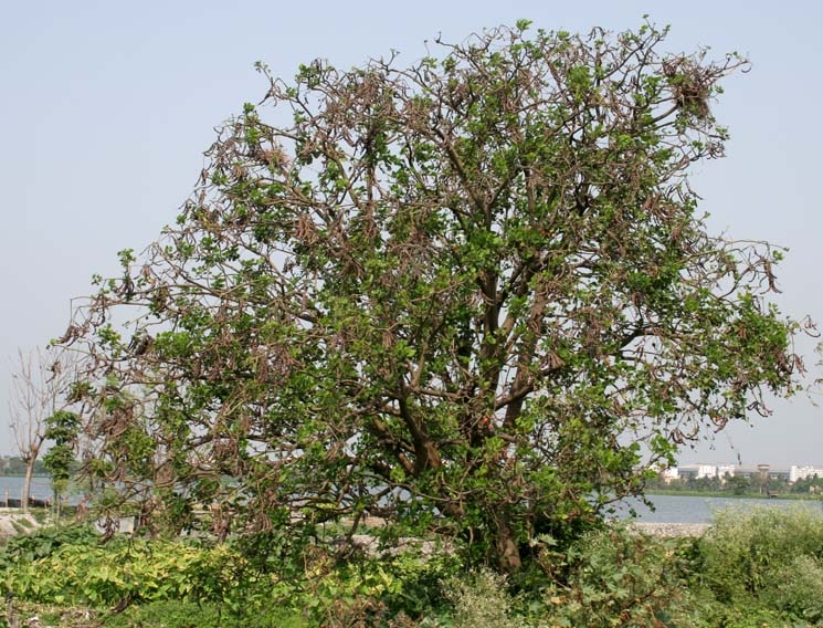 Indian Coral Tree Erythrina variegata in Kolkata, West Bengal, India.